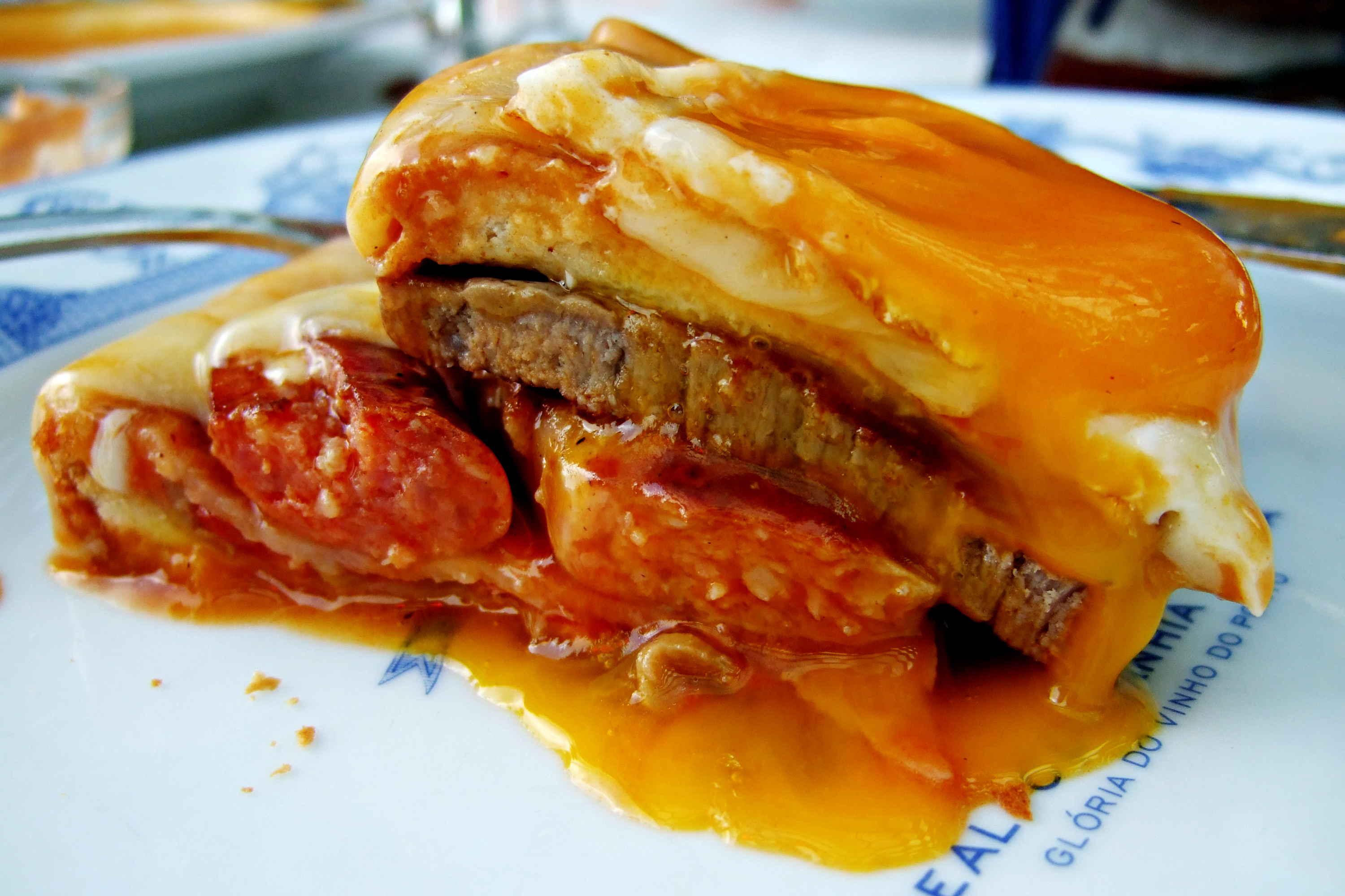 Bread, sausage, steak, cheese, egg ...